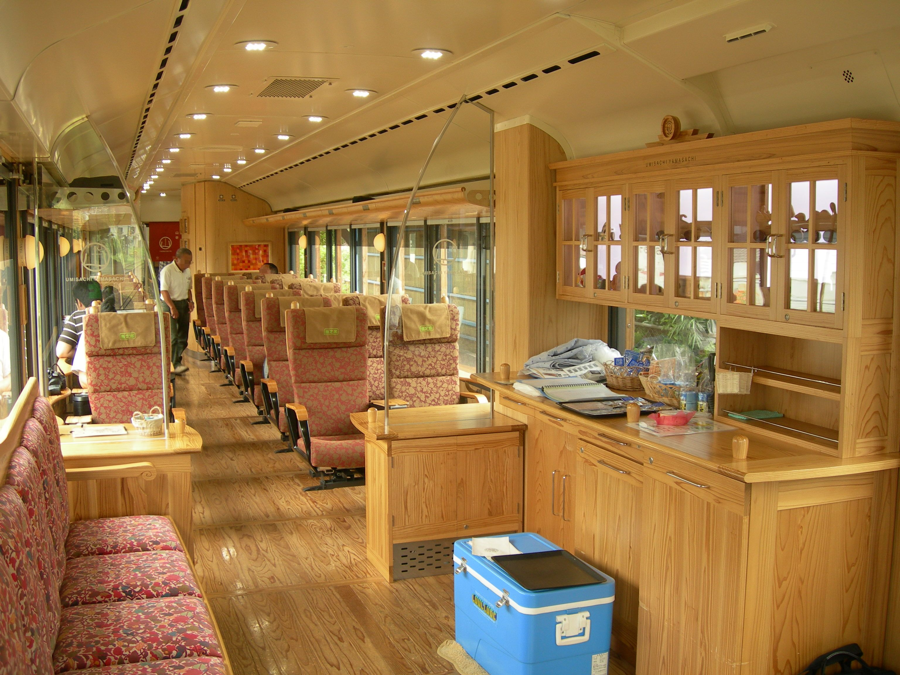 JR九州キハ125形気動車401「海幸山幸」車内